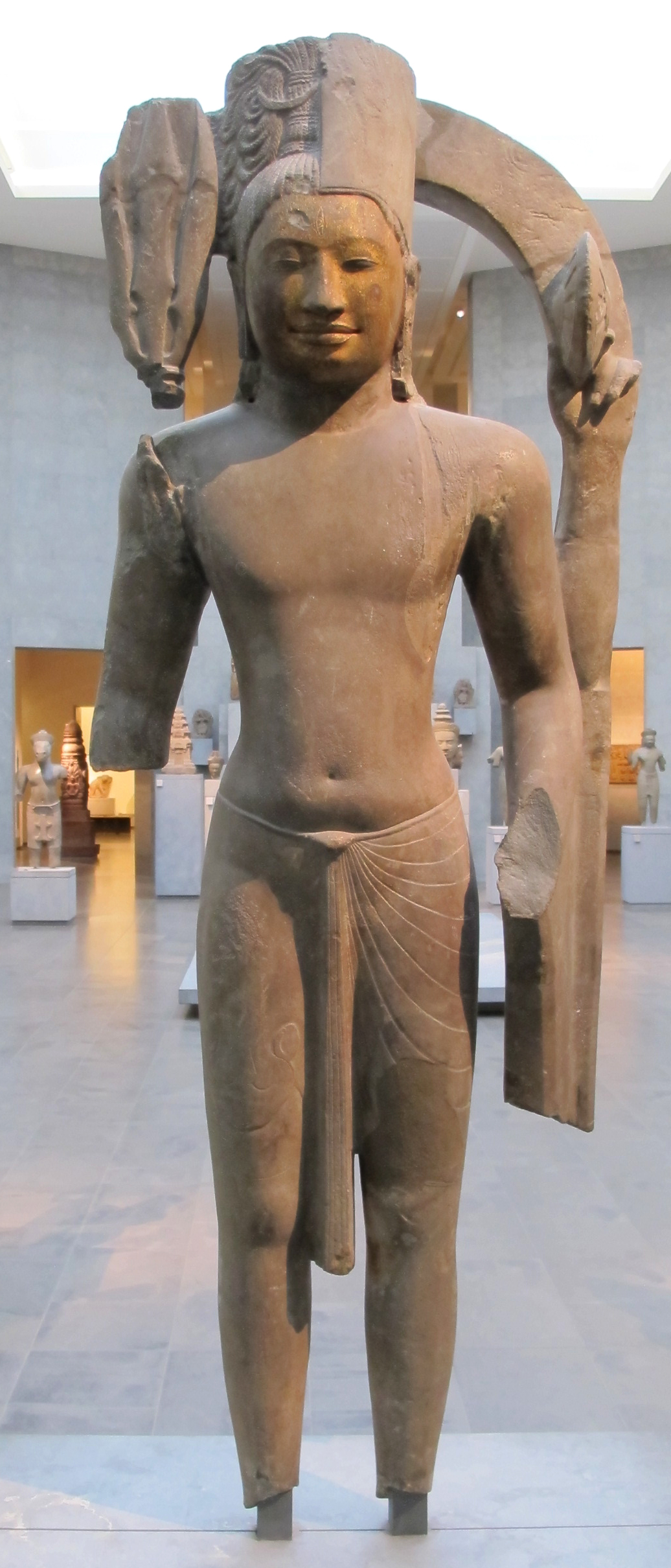 Cambogia, harihara da asram maha rosei, stile phnom da, vii sec. ca.